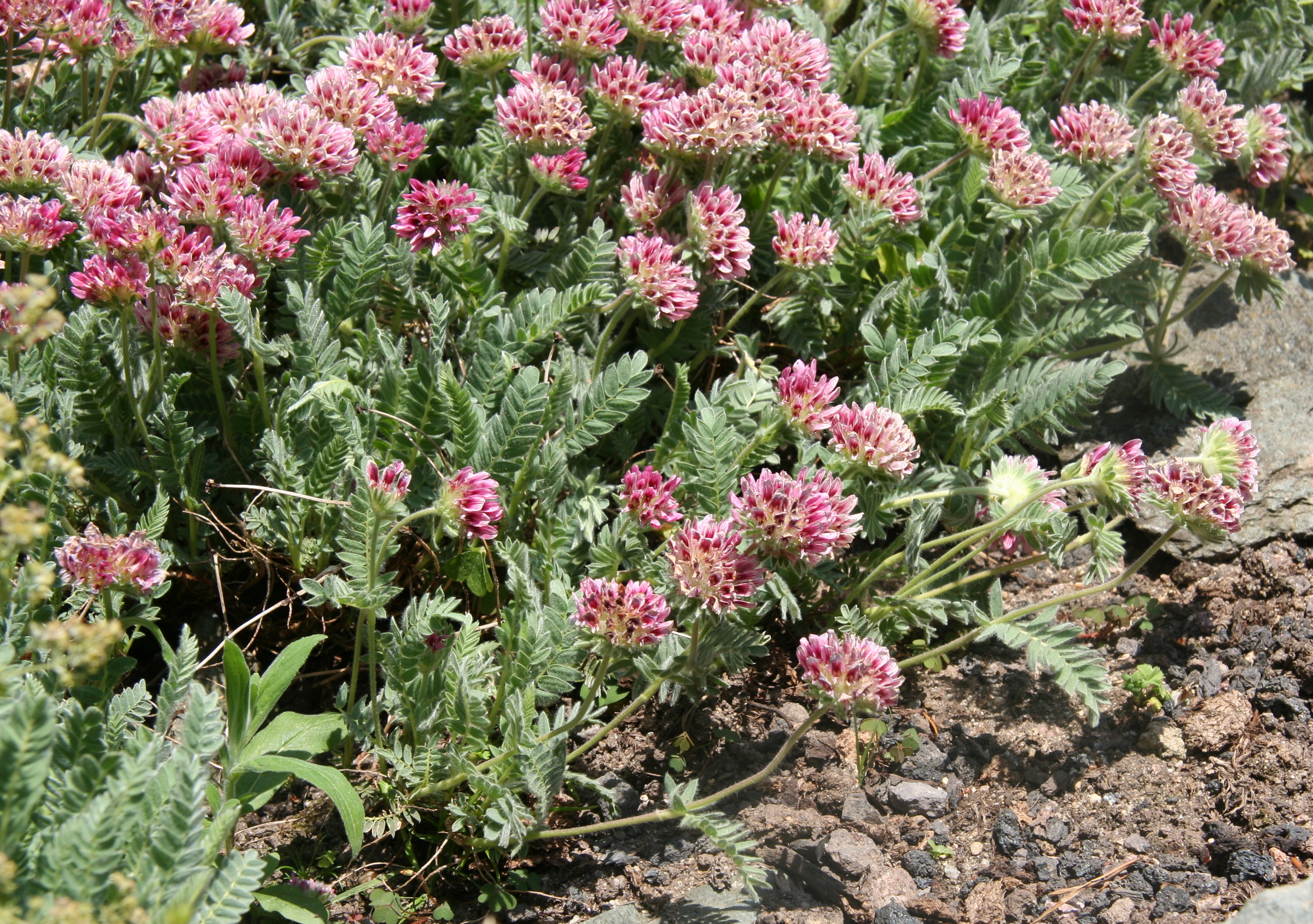 Anthyllis montana ssp. jacquinii im Botanischen Garten Dresden